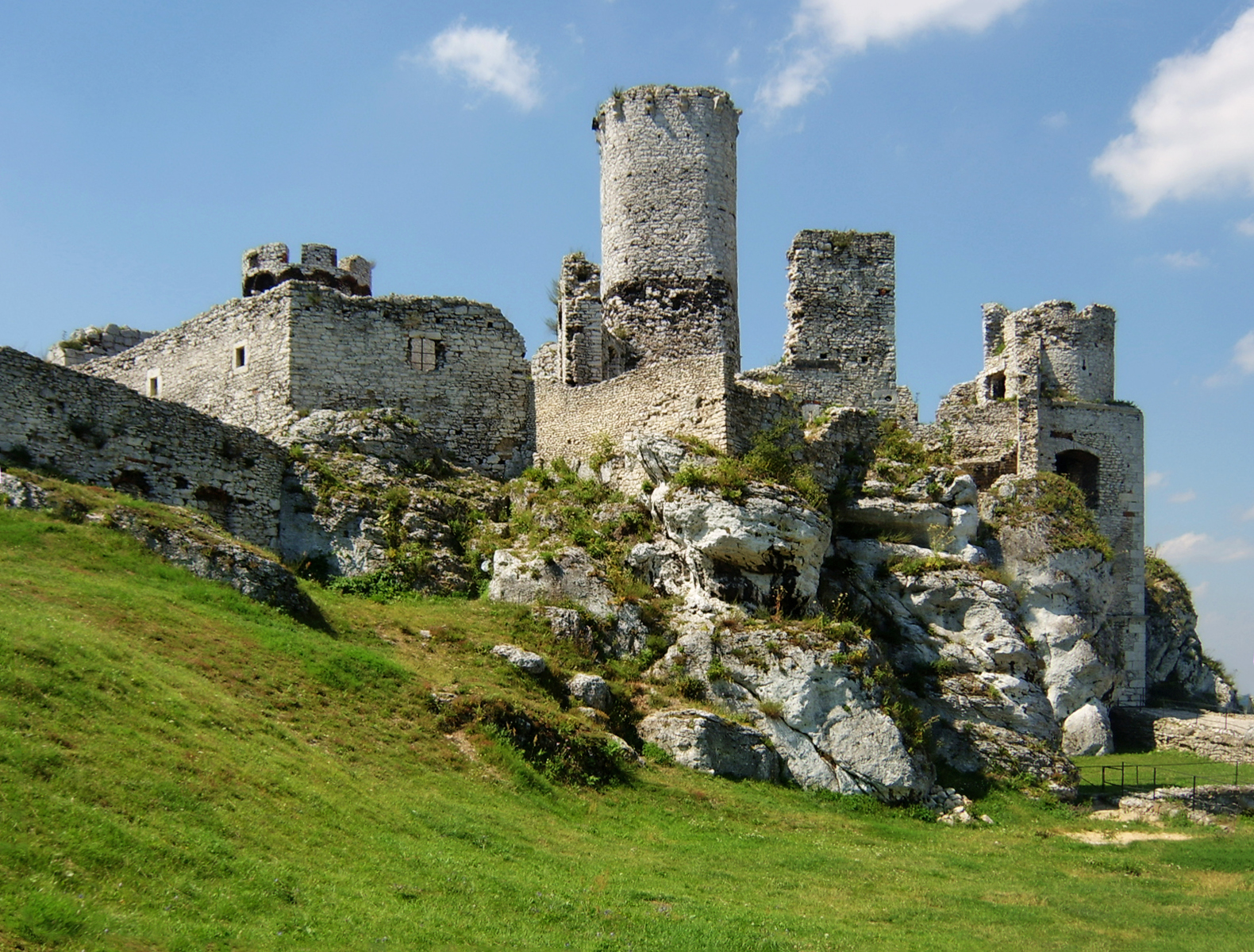 Ogrodzieniec Castle